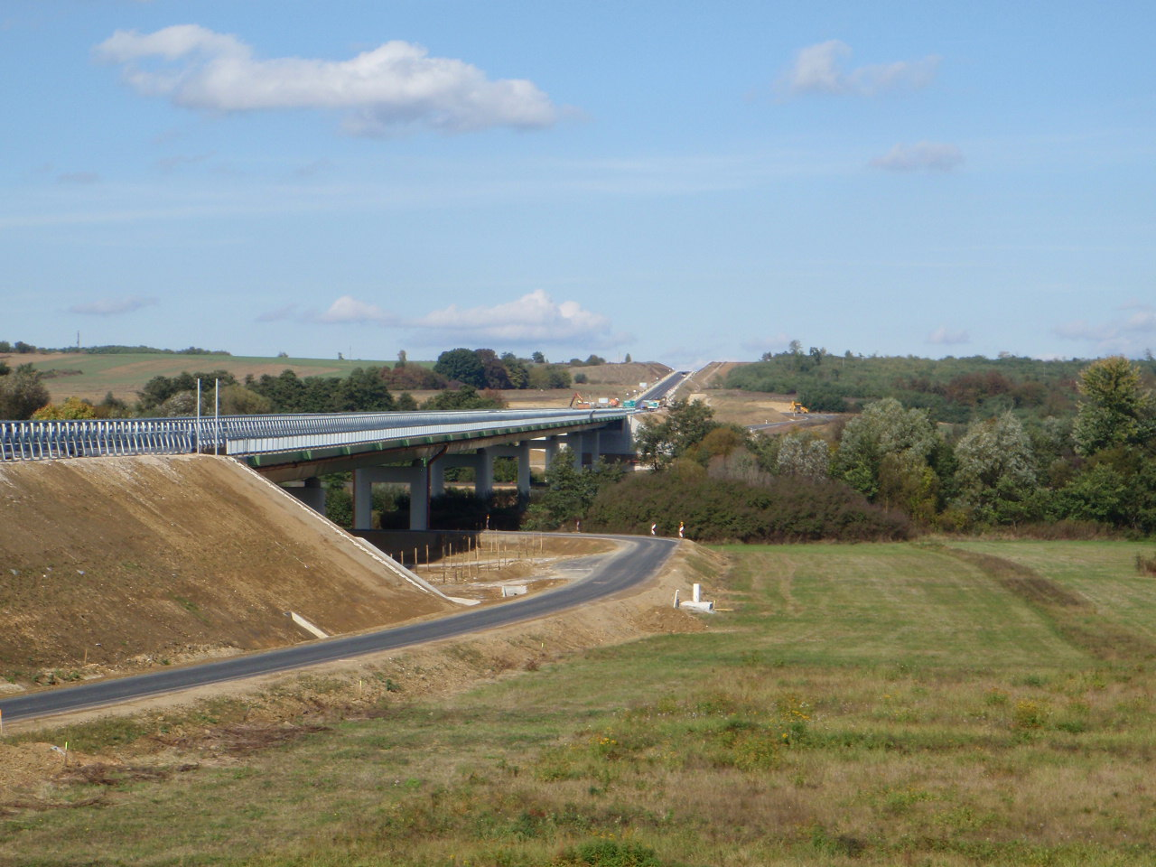 Zalalövő Völgyhíd